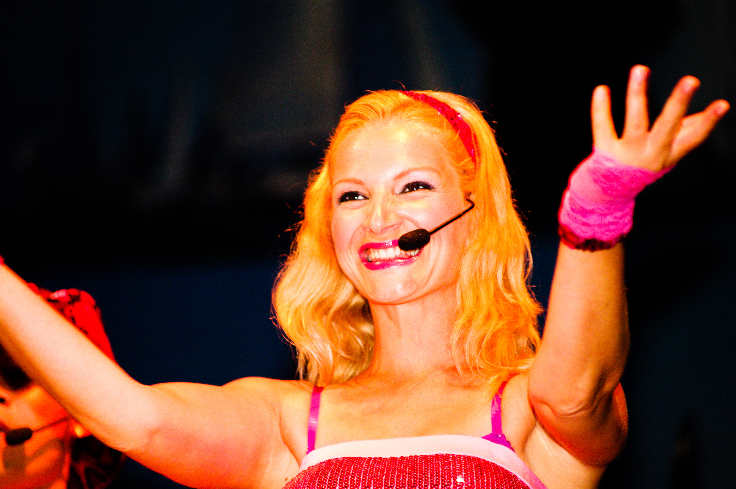 Denise Van Rijswijkder Popgruppe Vengaboys bei der NDR Welle Nord Sommertour Quickborn.